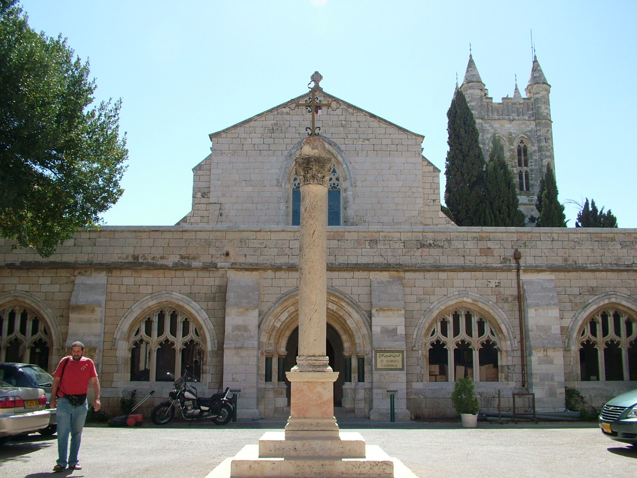 (he:ויקיפדיה:מיזמי ויקיפדיה/אלף מילים/טיול ירושלים - מזרח ירושלים